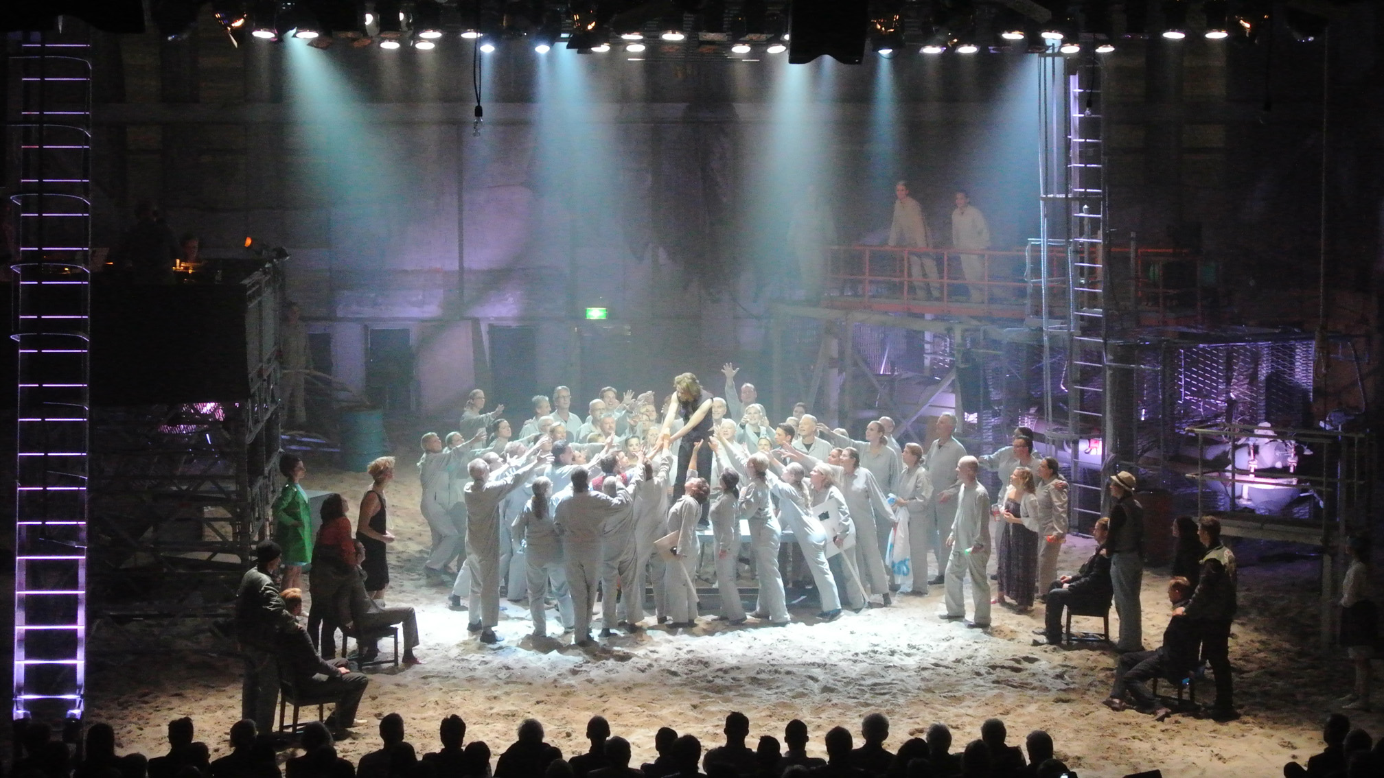 Premiere avond in de loods op het RDM terrein